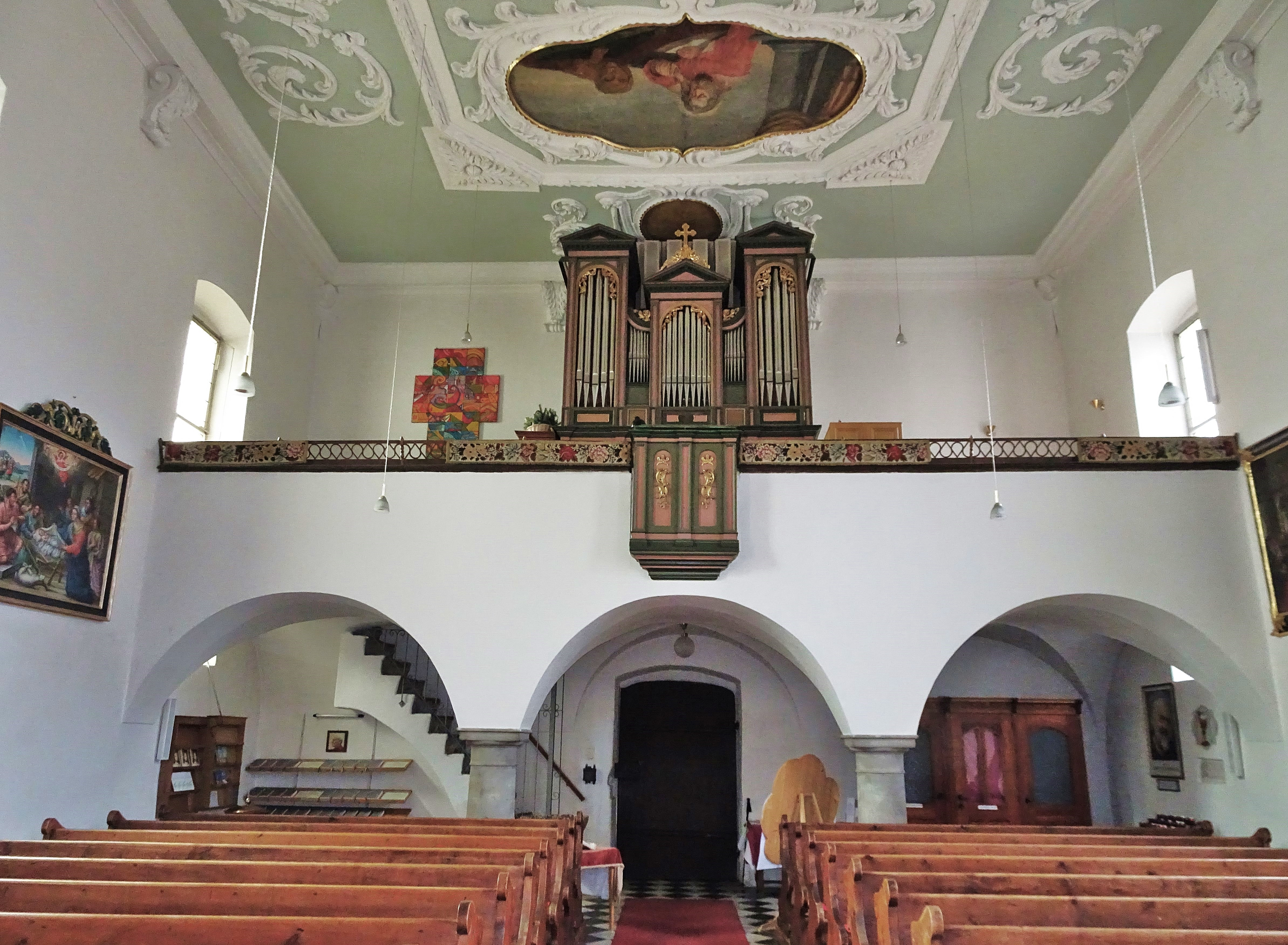 Kath. Pfarrkirche St. Maximilian Treffen, Blick gegen die Orgelempore